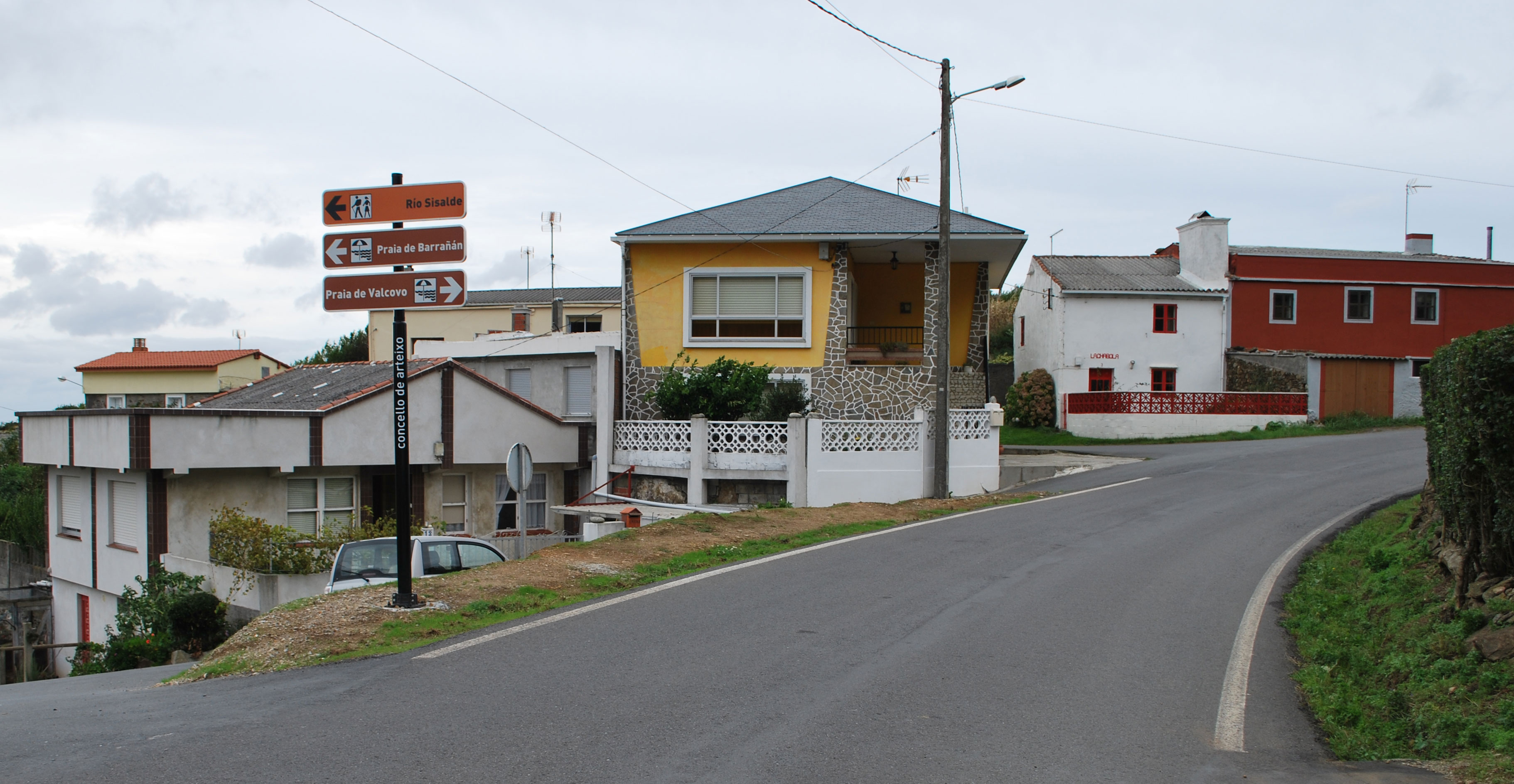 Vista do Campo, Barrañán Arteixo A Coruña Galiza